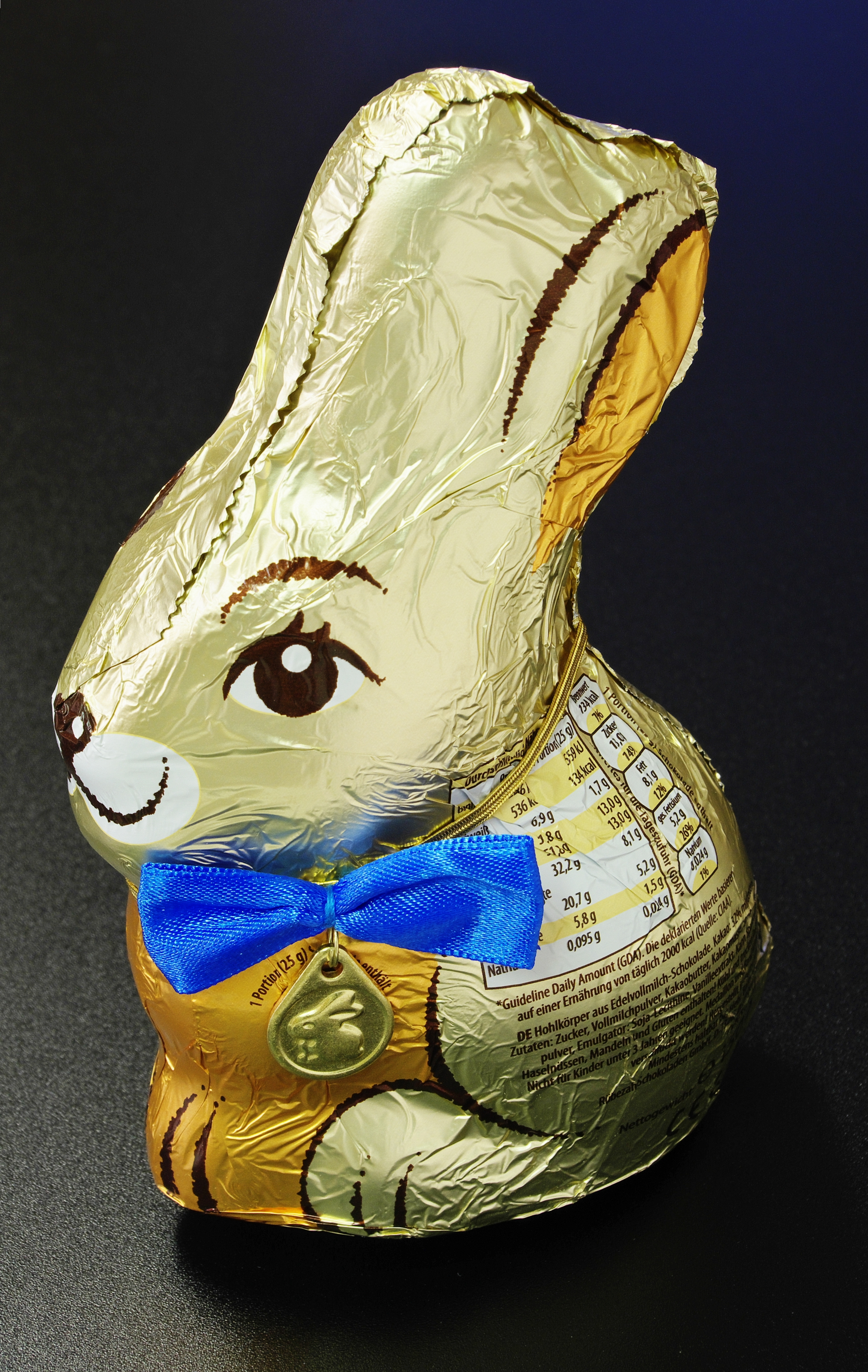 Schokoladenhase